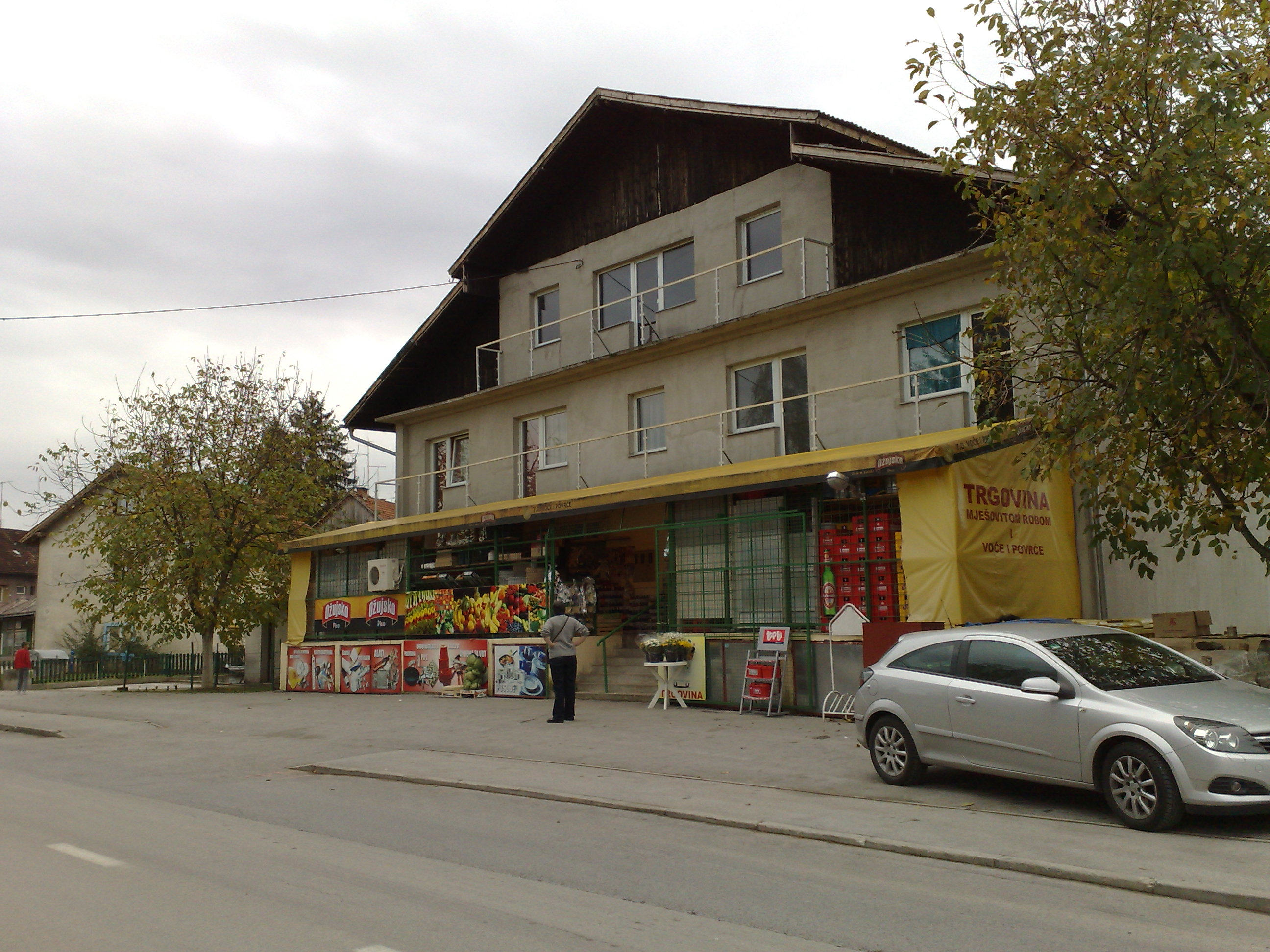 31.10.2012. _ Vojnic